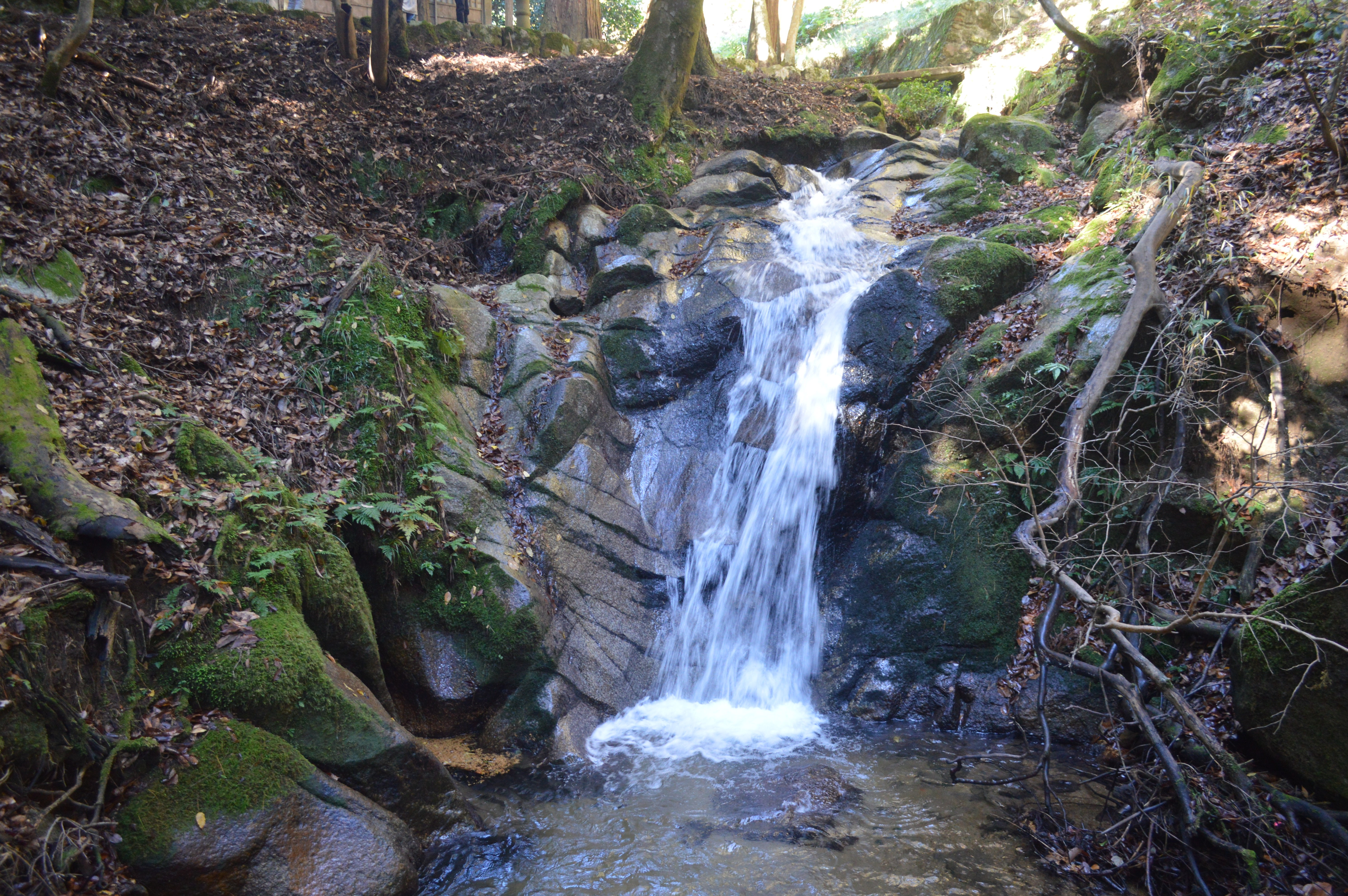 京都府京丹後市大宮町上常吉にある白滝。近くには白瀧不動明王（白滝不動堂）がある。